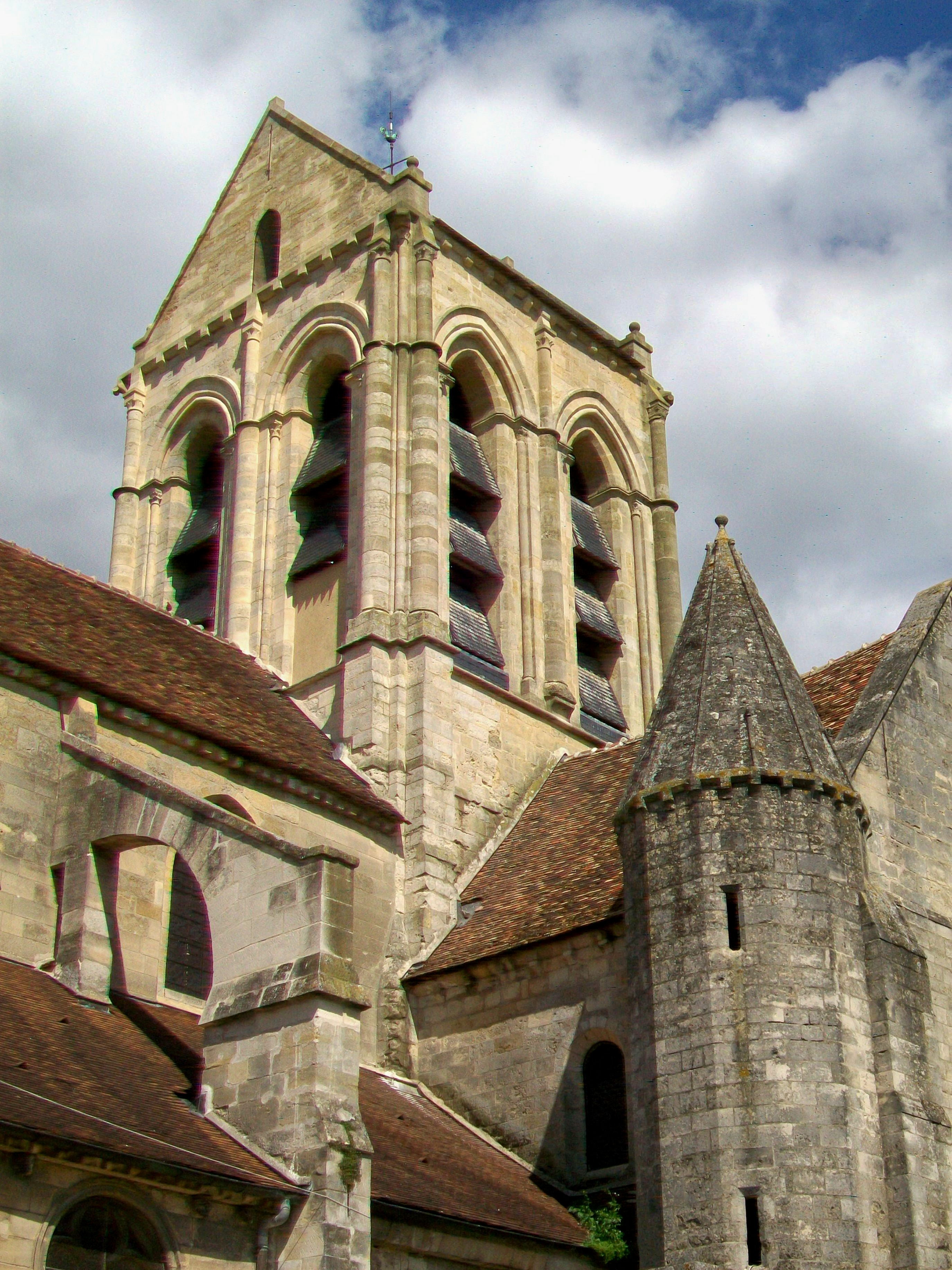 Le clocher de l'église, depuis le sud-ouest.